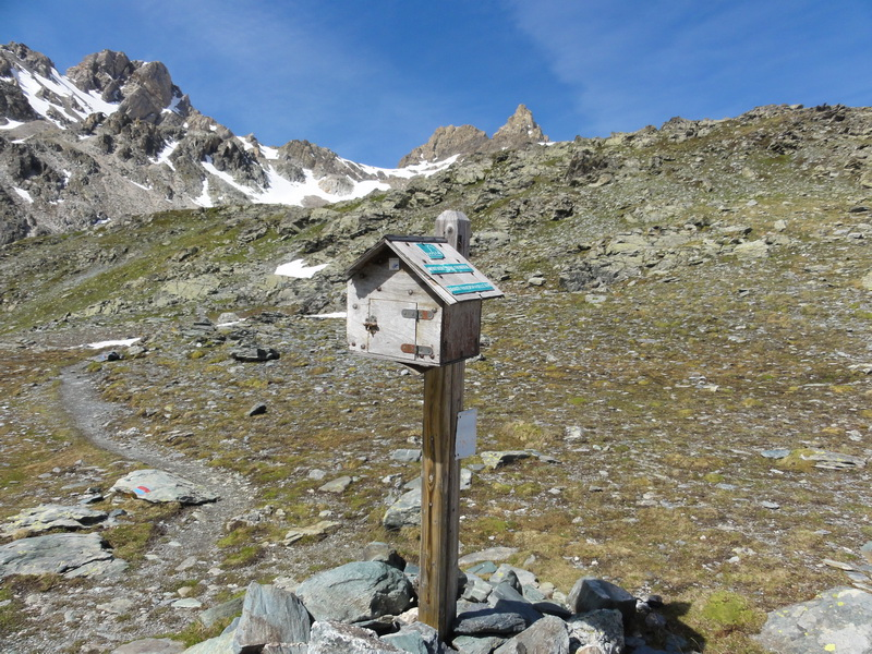 La boite aux lettres la plus haute d'Europe, au col Mary 2.640m